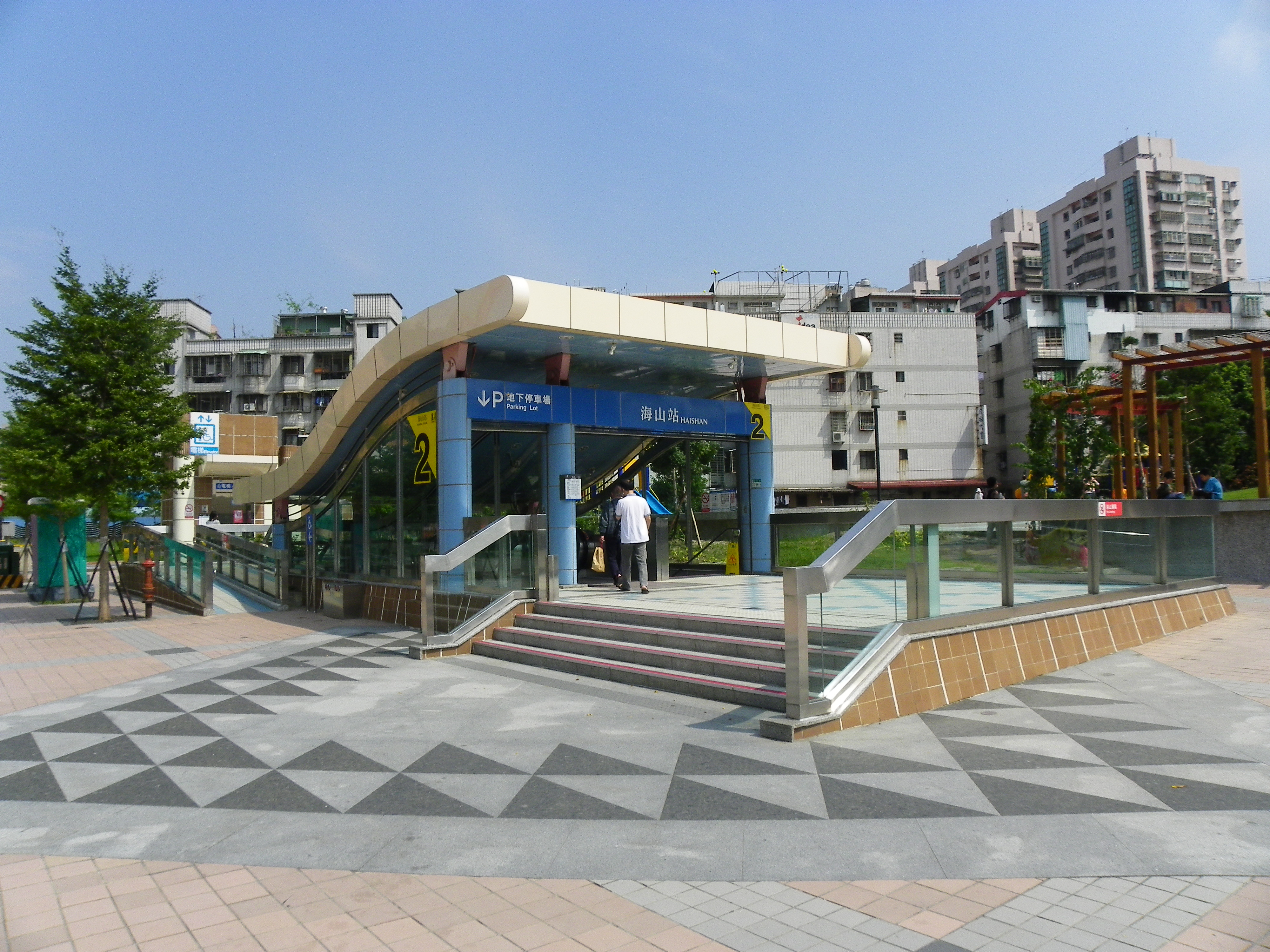 台北捷運土城線海山駅2号出口。